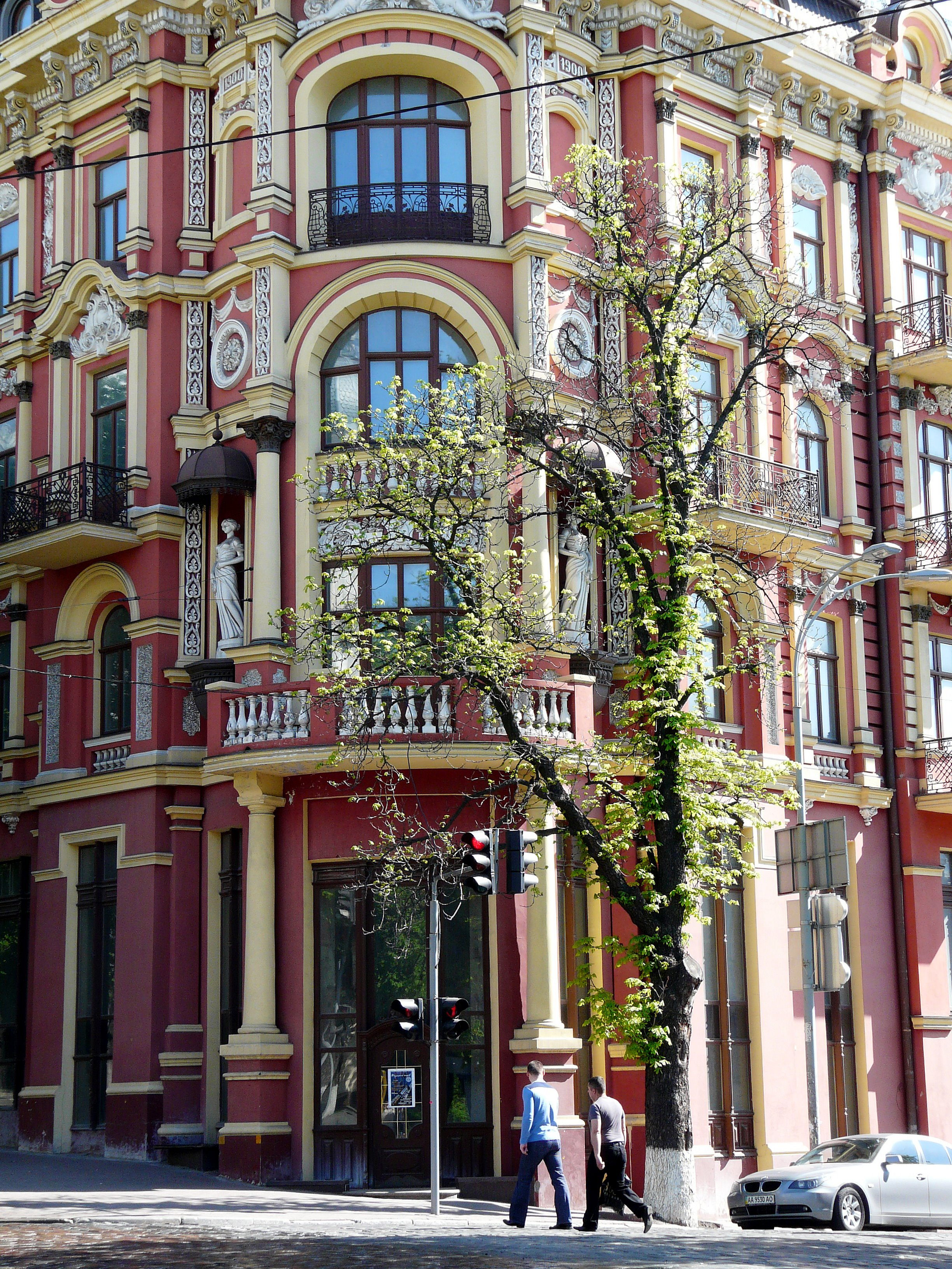 Будинок прибутковий, Київ, Володимирська вул., 39/24